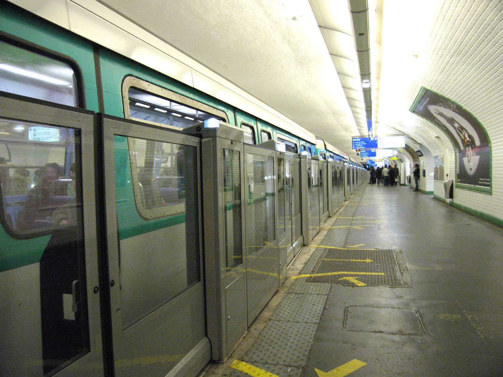 Métro de Paris, Station Gare St-Lazare (ligne 13), Paris, France. Portes automatiques CNIM CURTIS en test.